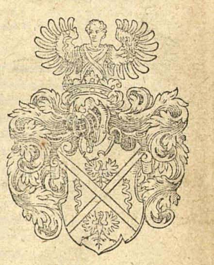 Wappen der Familie Weyer; aus der Festschrift zur Hochzeit von Katharina Weyer († 1598), Tochter von Heinrich Weyer († 1591), Enkelin von Johann Weyer († 1588)